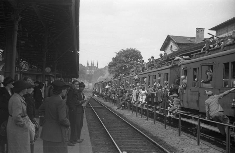 Überfüllte Züge - ein Kennzeichen der ersten Nachkriegsjahre. Die Aufnahme entstand in Remagen.